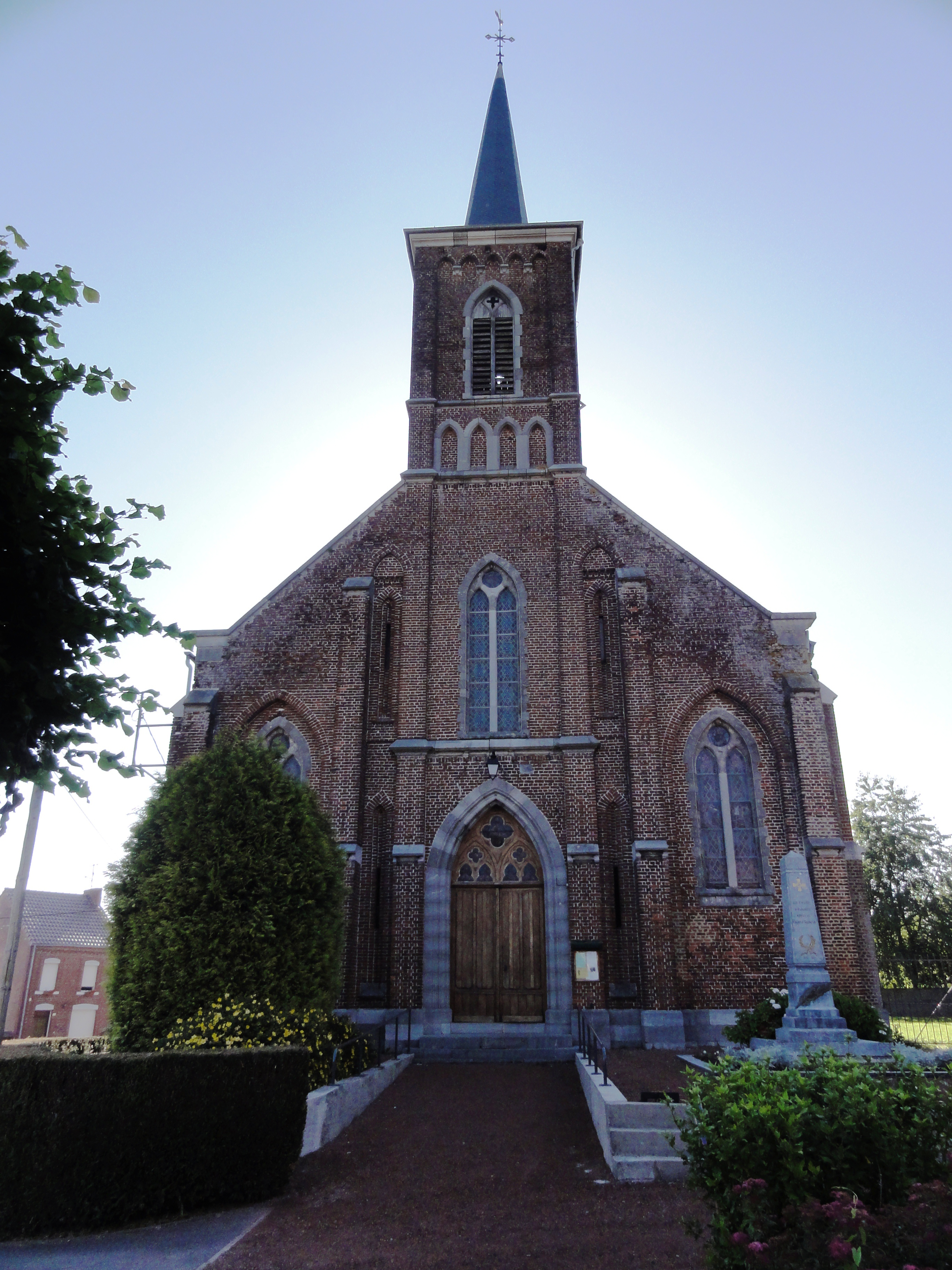 Hargnies (Nord, Fr) église, façade